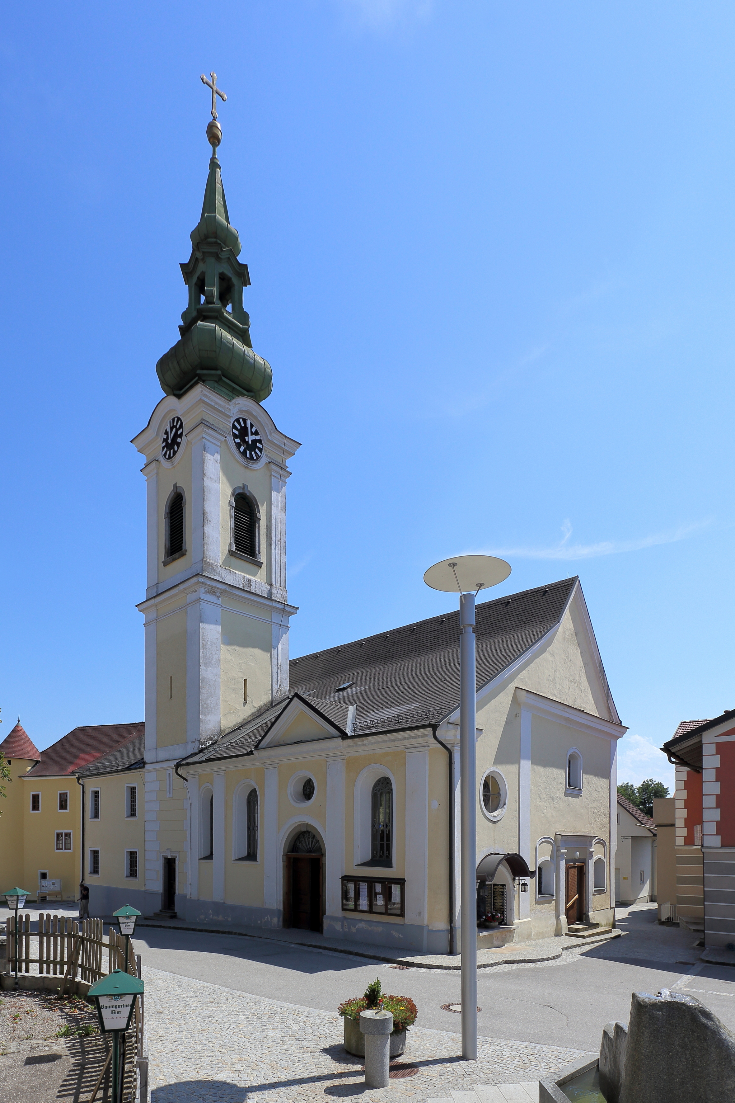 Katholische Pfarrkirche hl. Pankraz in der oberösterreichischen Gemeinde Sigharting. Ursprünglich eine spätgotische, dreijochige Kapelle. 1680 wurde die Kapelle um ein Joch Richtung Westen erweitert und 1807 wurde im Osten ein dreijochiger Chor mit einem 3/12-Schluß angebaut.